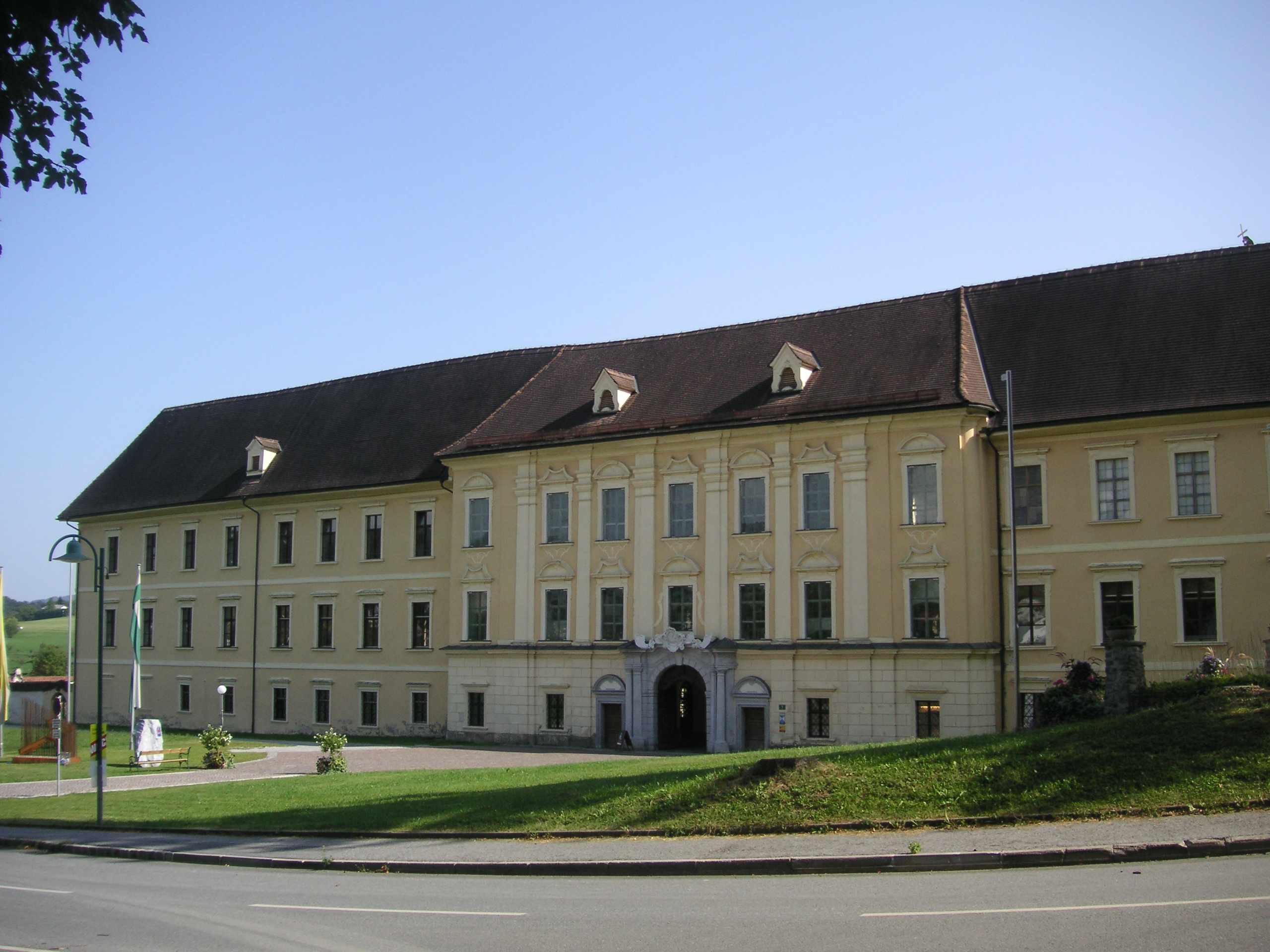 Fassaden an der nörldichen Aussenmauer des Stiftes Rein